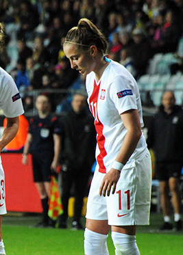 a_40_3863